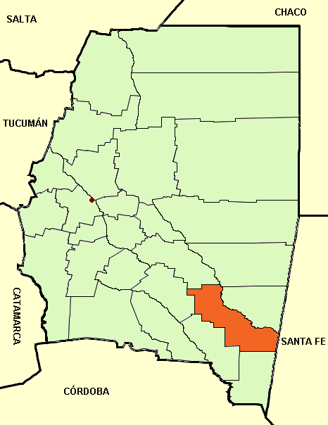 Departamento Mapa editado de: Santiago del Estero province (Argentina), departments and capital.png